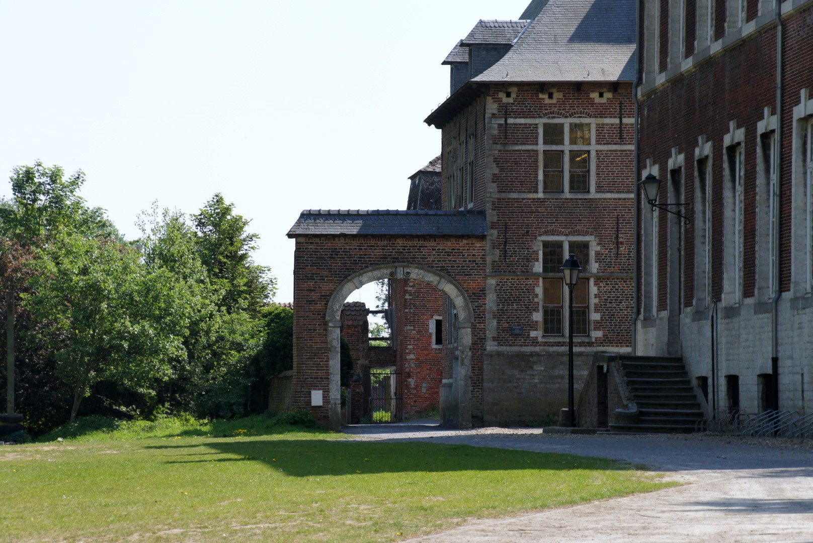 Een 18de eeuwse poort geeft toegang tot een complex dat tot 1999 dienst deed als boerderij. In de 16e eeuw was dit gebouw het oude abtskwartier, gebouwd in traditionele bak- en zandsteen stijl. De kelders gaan terug tot de late middeleeuwen en vormen het oudste deel van het abdijcomplex.